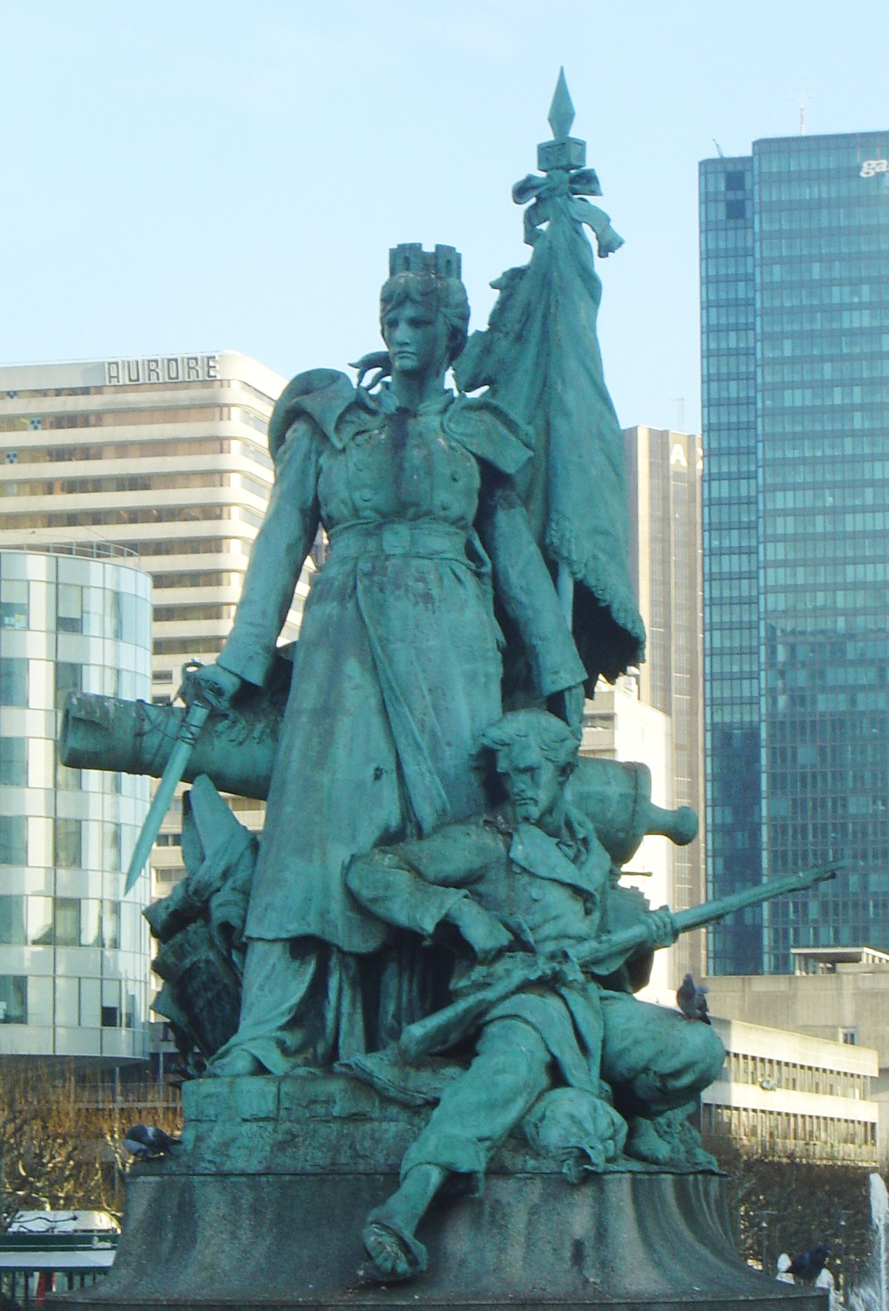 Sculpture à Paris, au quartier de La Défense